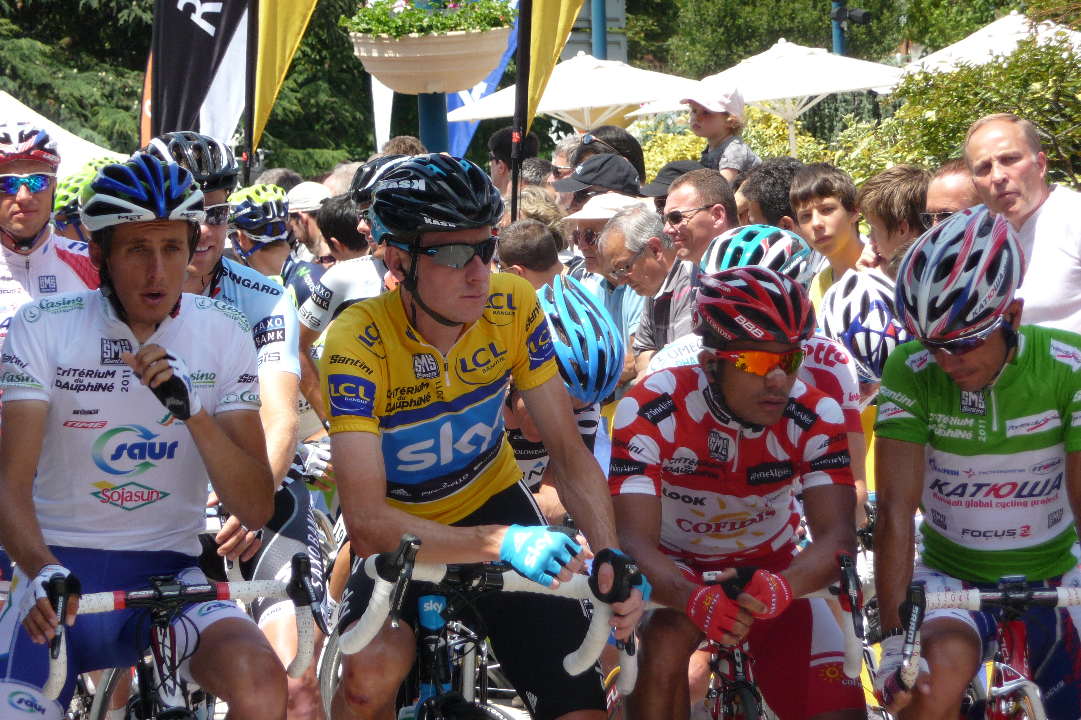 Départ de la 7e et dernière étape du Critérium du Dauphiné 2011 à Pontcharra. De gauche à droite : COPPEL Jérôme SAUR-SOJASUN (Meilleur jeune) WIGGINS Bradley SKY PROCYCLING (Leader) DUQUE Leonardo COFIDIS LE CREDIT EN LIGNE (Meilleur grimpeur) RODRIGUEZ OLIVER Joaquim KATUSHA TEAM (Meilleur sprinter)